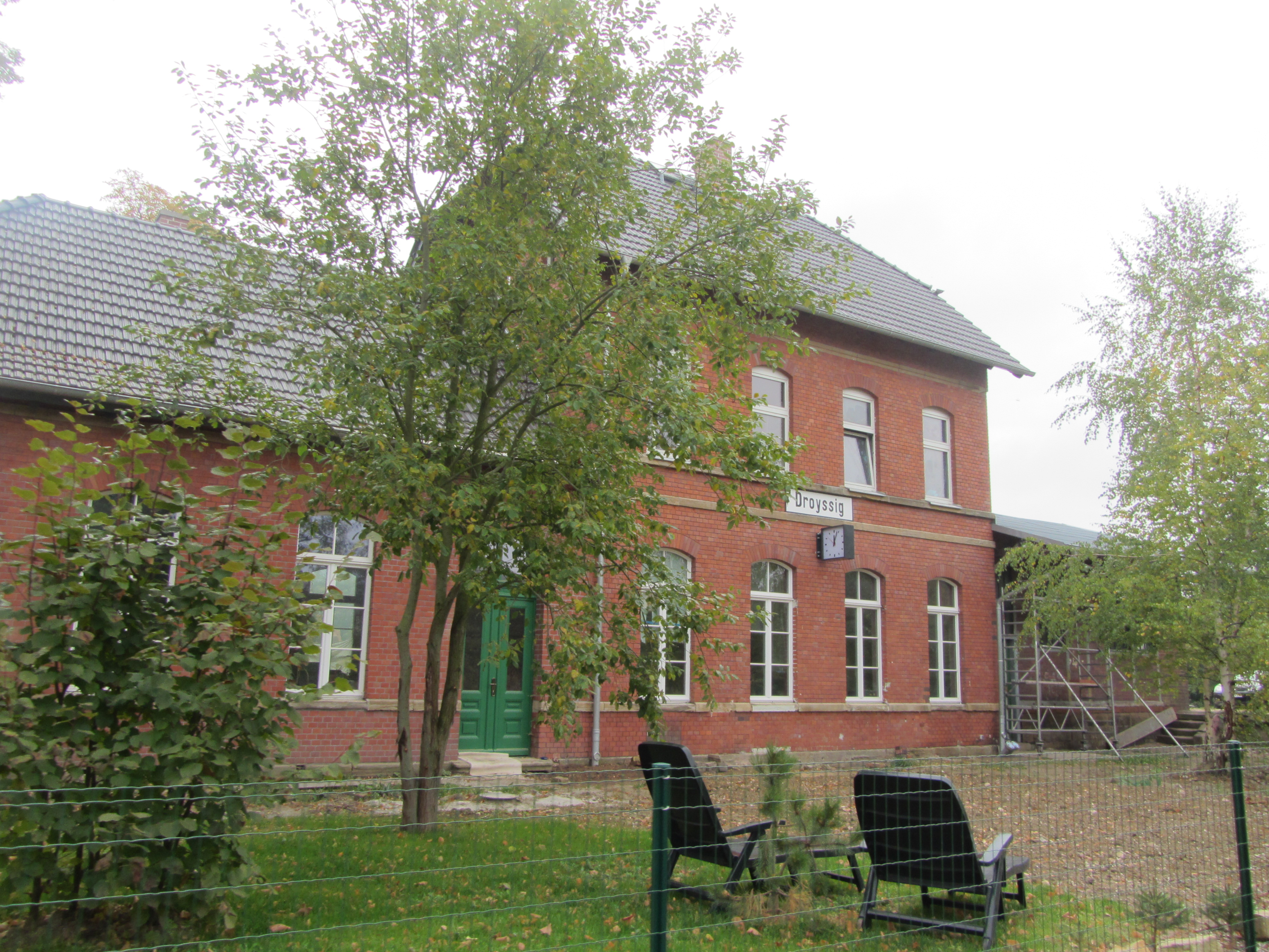 Bahnhof Droyßig an der ehemaligen Bahnstrecke Zeitz-Camburg